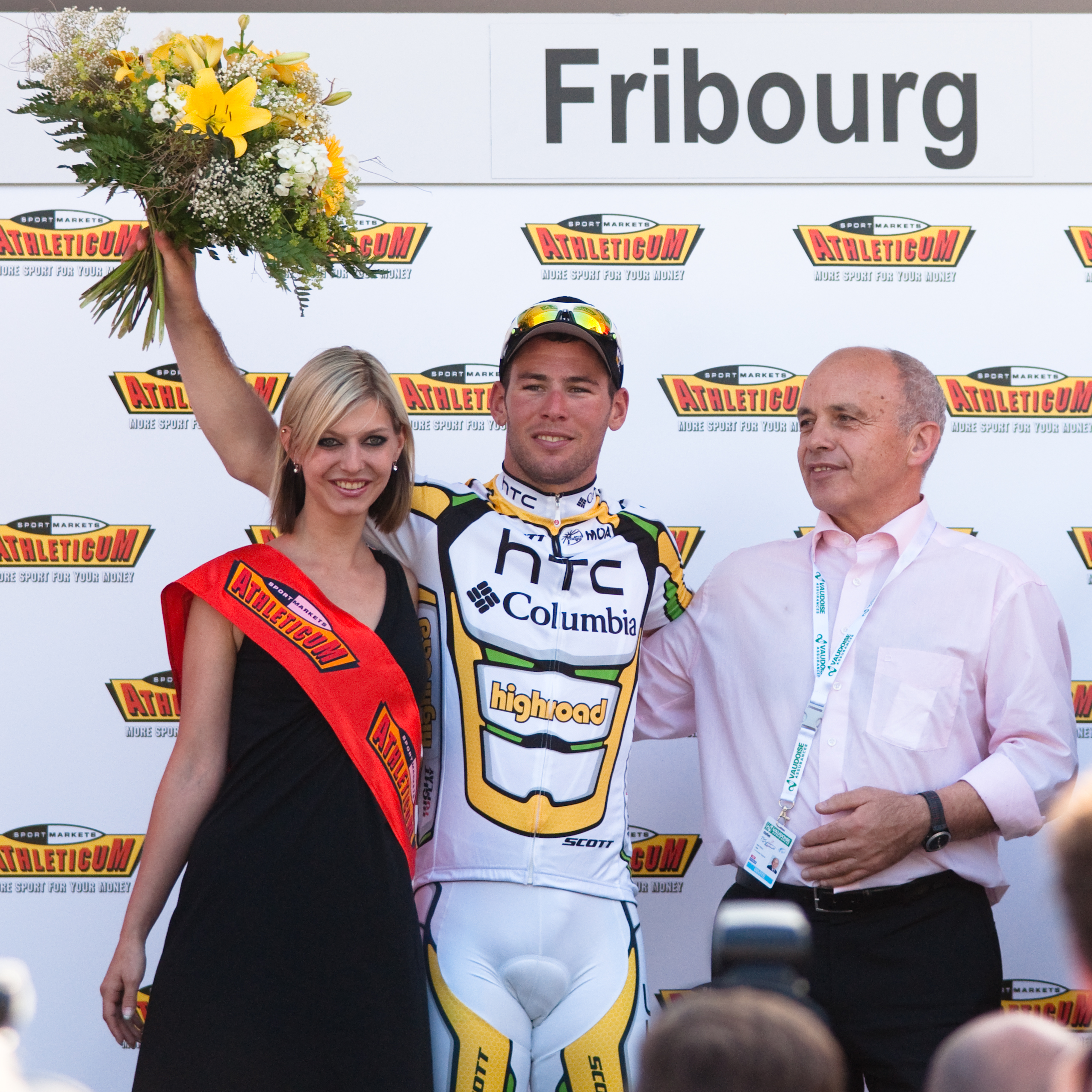 Mark Cavendish pour sa victoire lors de la seconde étape du Tour de Romandie 2010. Le conseiller fédéral Ueli Maurer sur la droite.